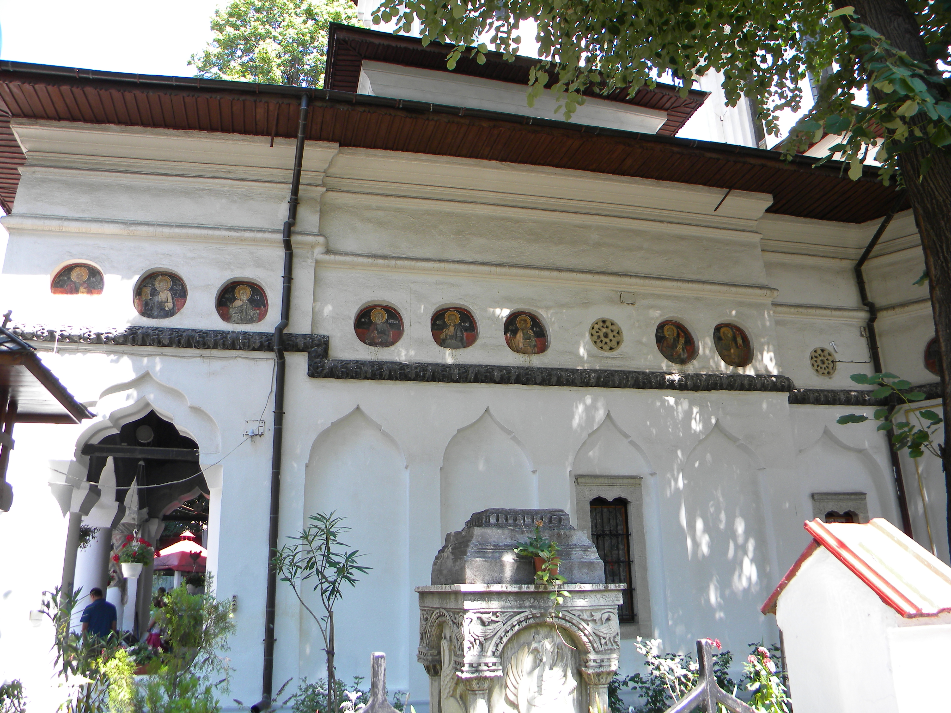 Bucuresti, Romania, Str. Batistei nr. 21 si Str. General Praporgescu David nr. 2; Biserica Adormirea Sfintei Ana; B-II-m-A-18095 (imagine laterala)